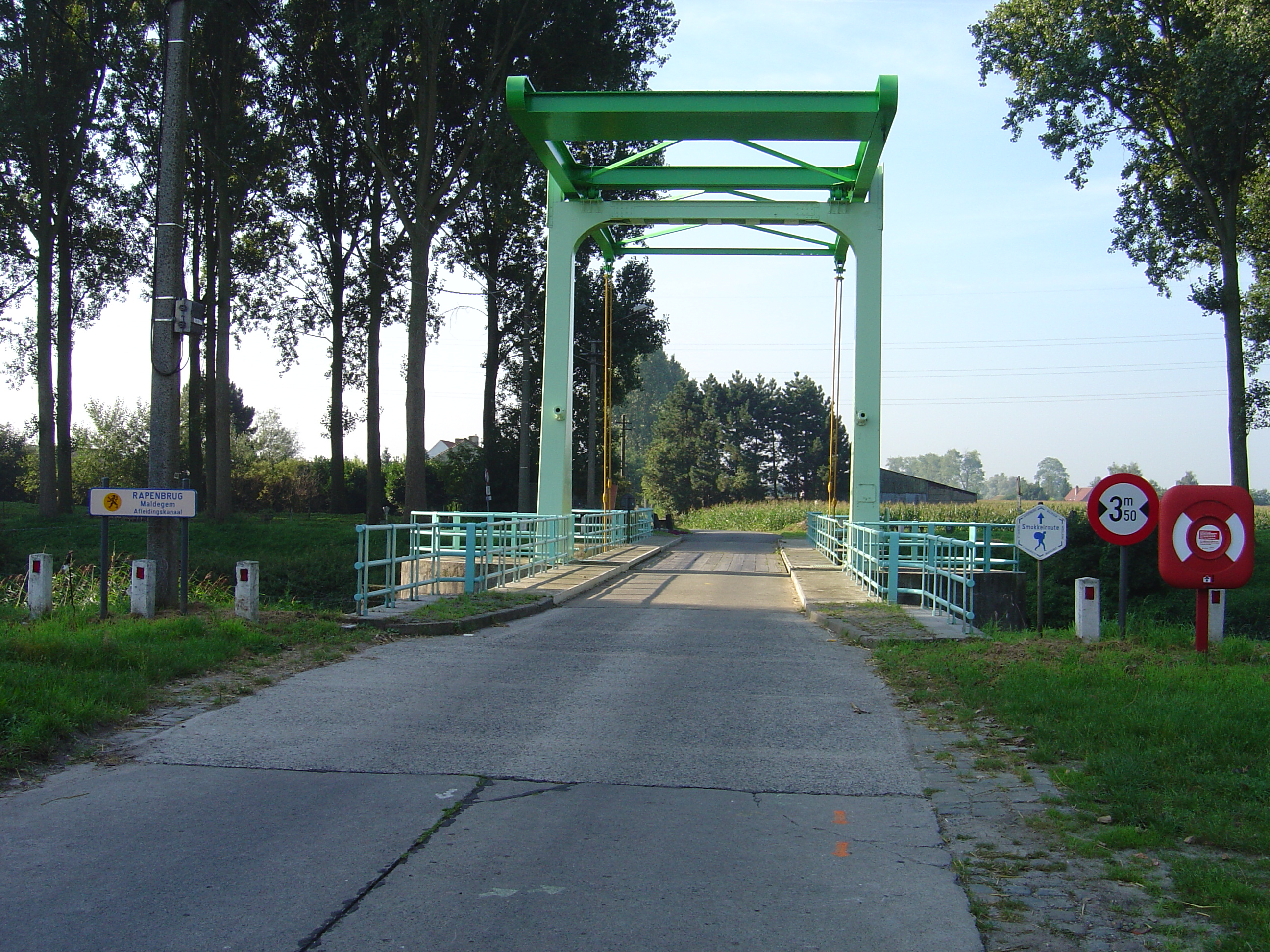 Rapenbrug over het afleidingskanaal.